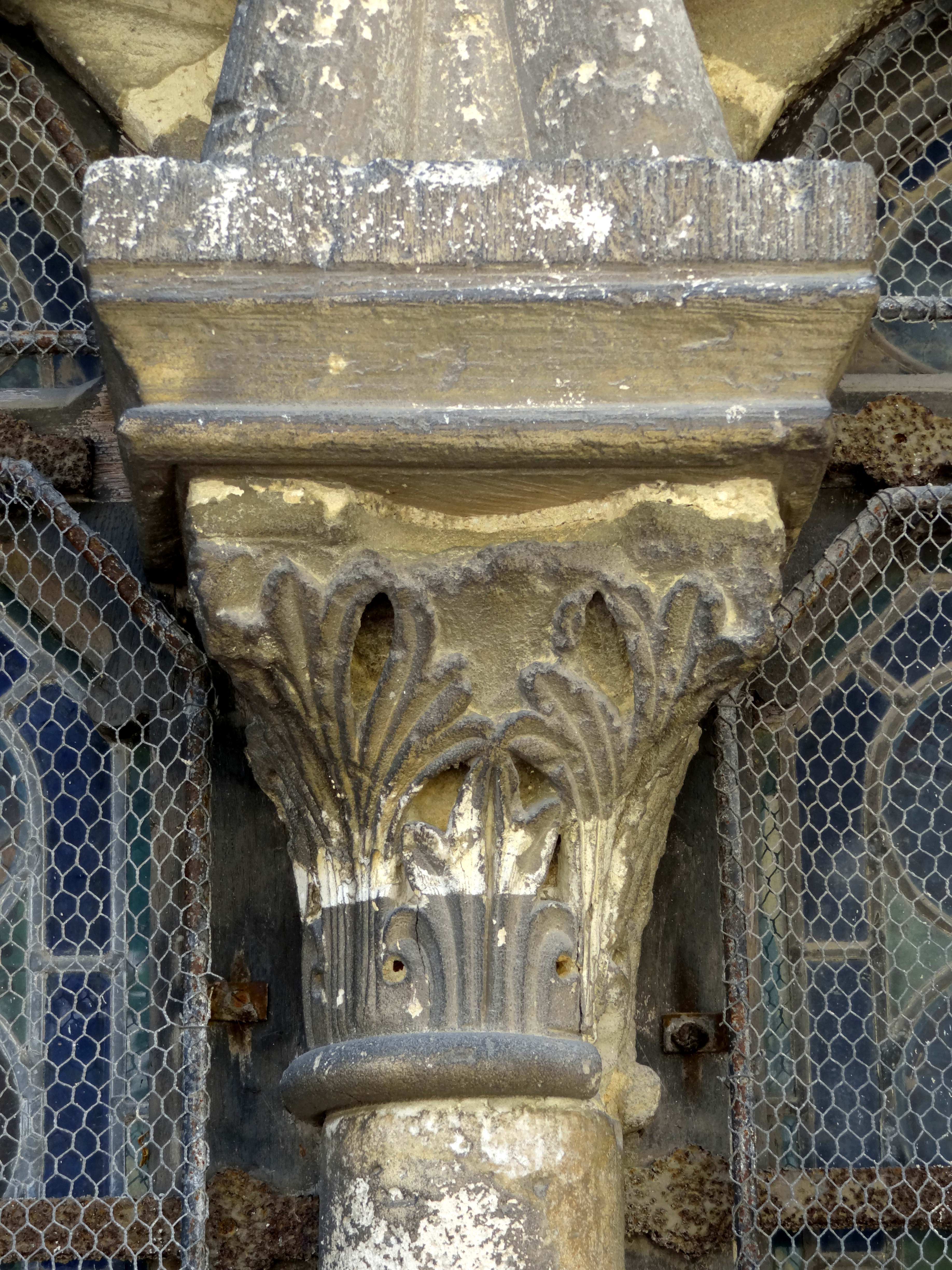 Église Sainte-Madeleine de Trie-Château - voir titre.